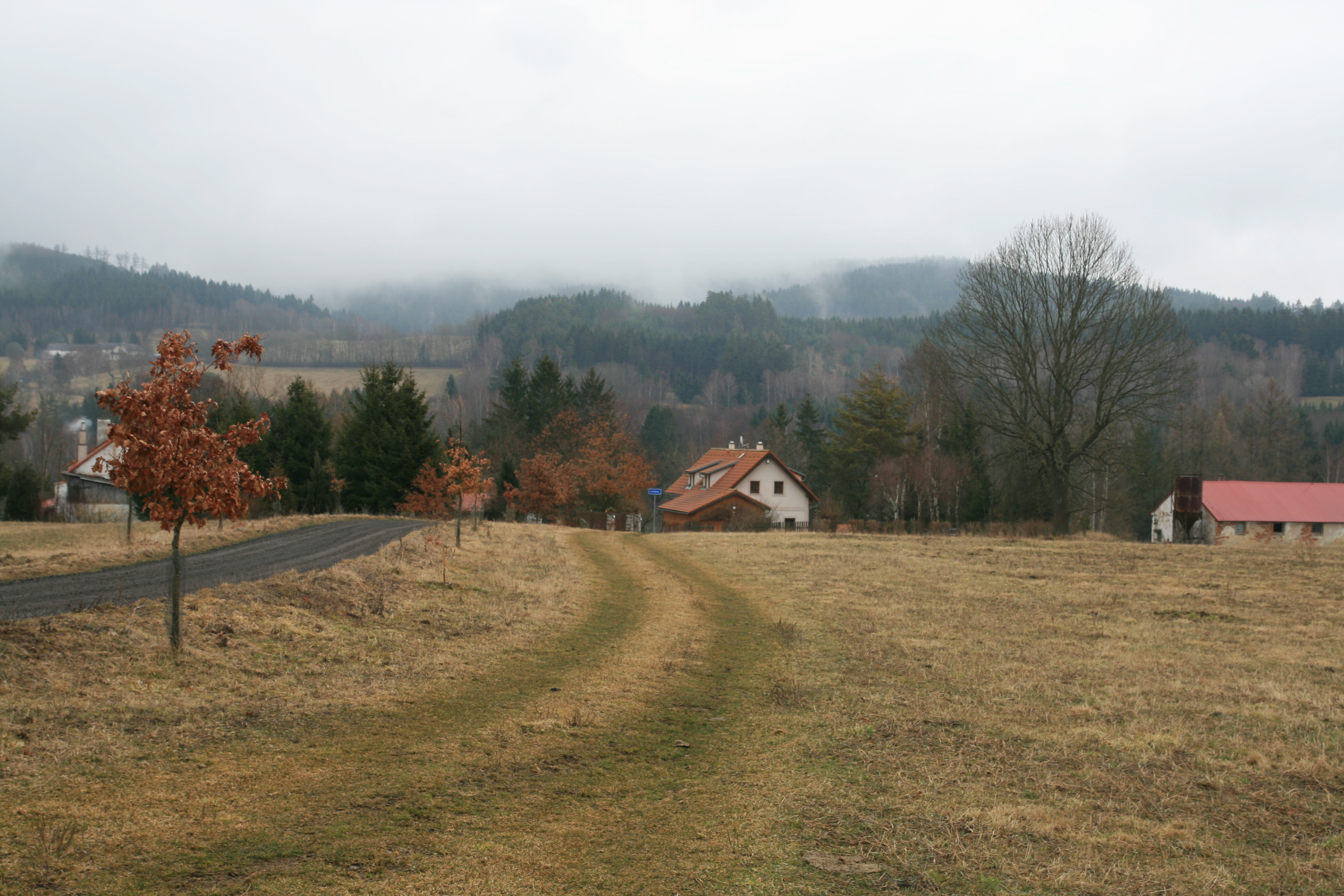 Vesnice Dubová, část městyse Přídolí v okrese Český Krumlov. Pohled od hlavní silnice.